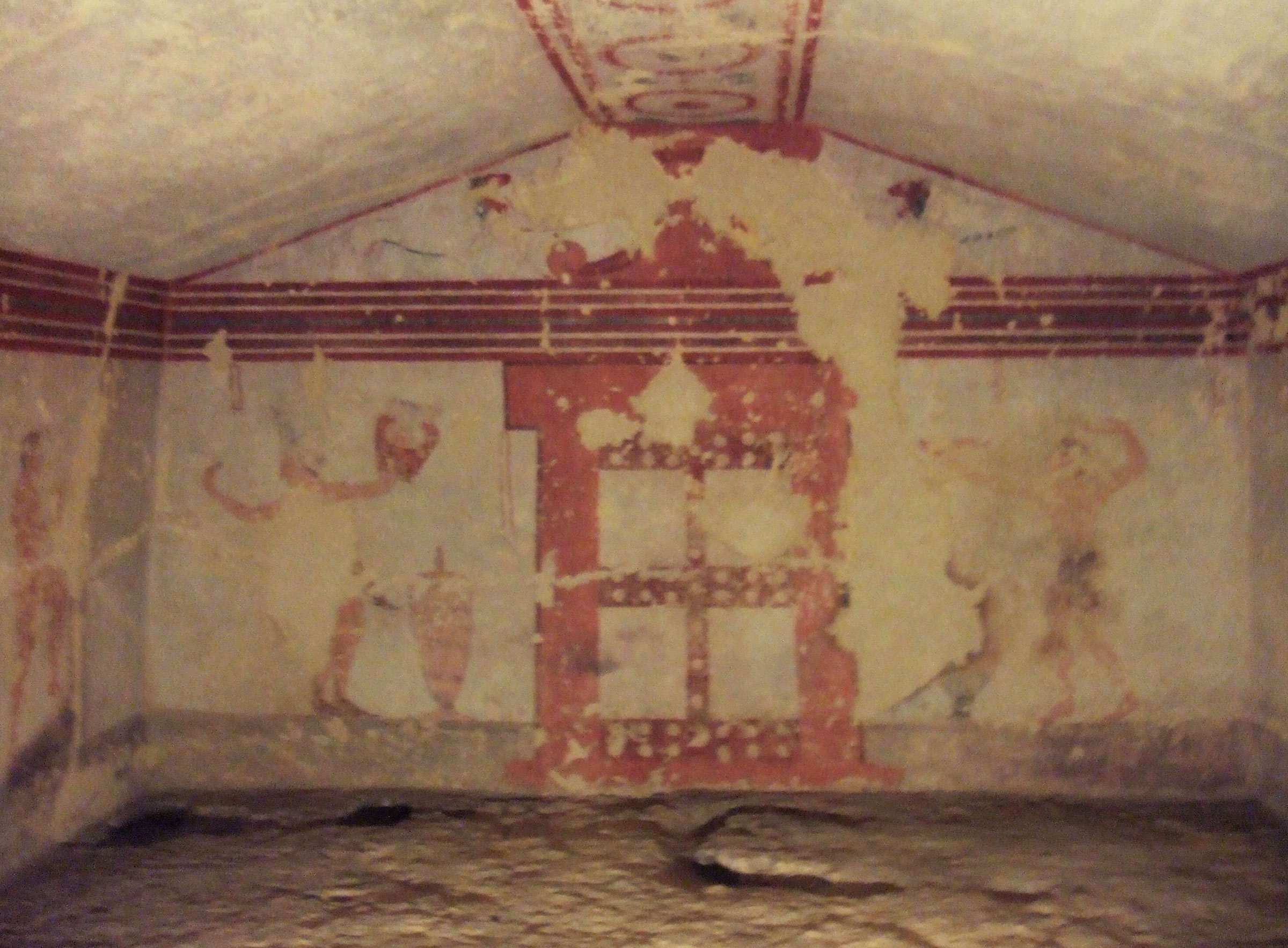 Fresque frontale de la « Tombe de la Fustigation » du site de Monterozzi (Latium)